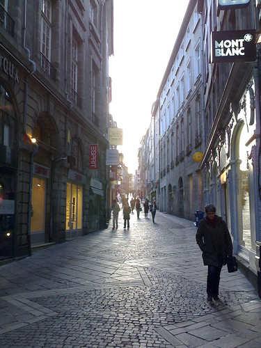 La rue du Consulat, à Limoges (Haute-Vienne, France) ; une des principales rues commerçantes de la ville